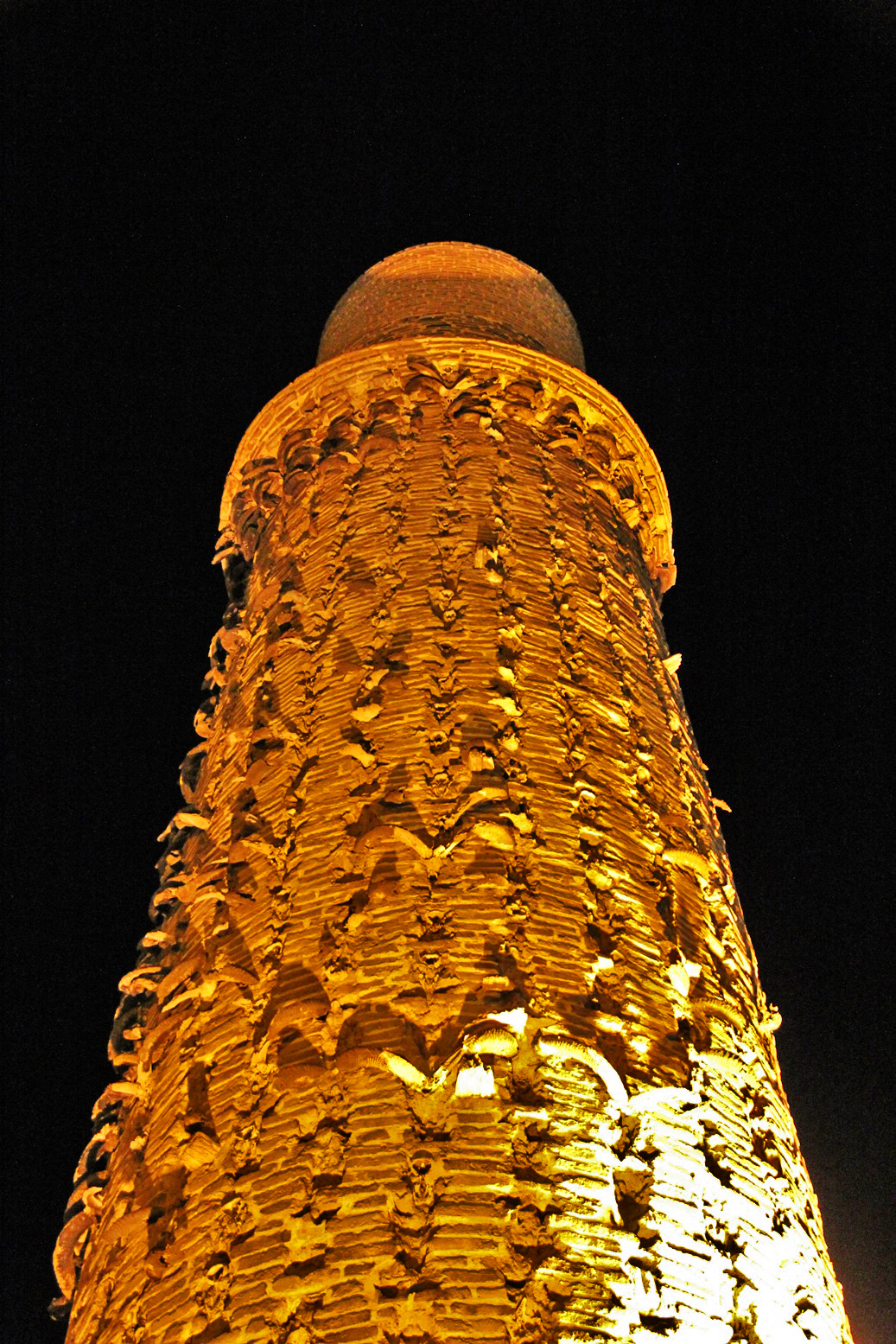 مناره شمس تبریزی دینبلی